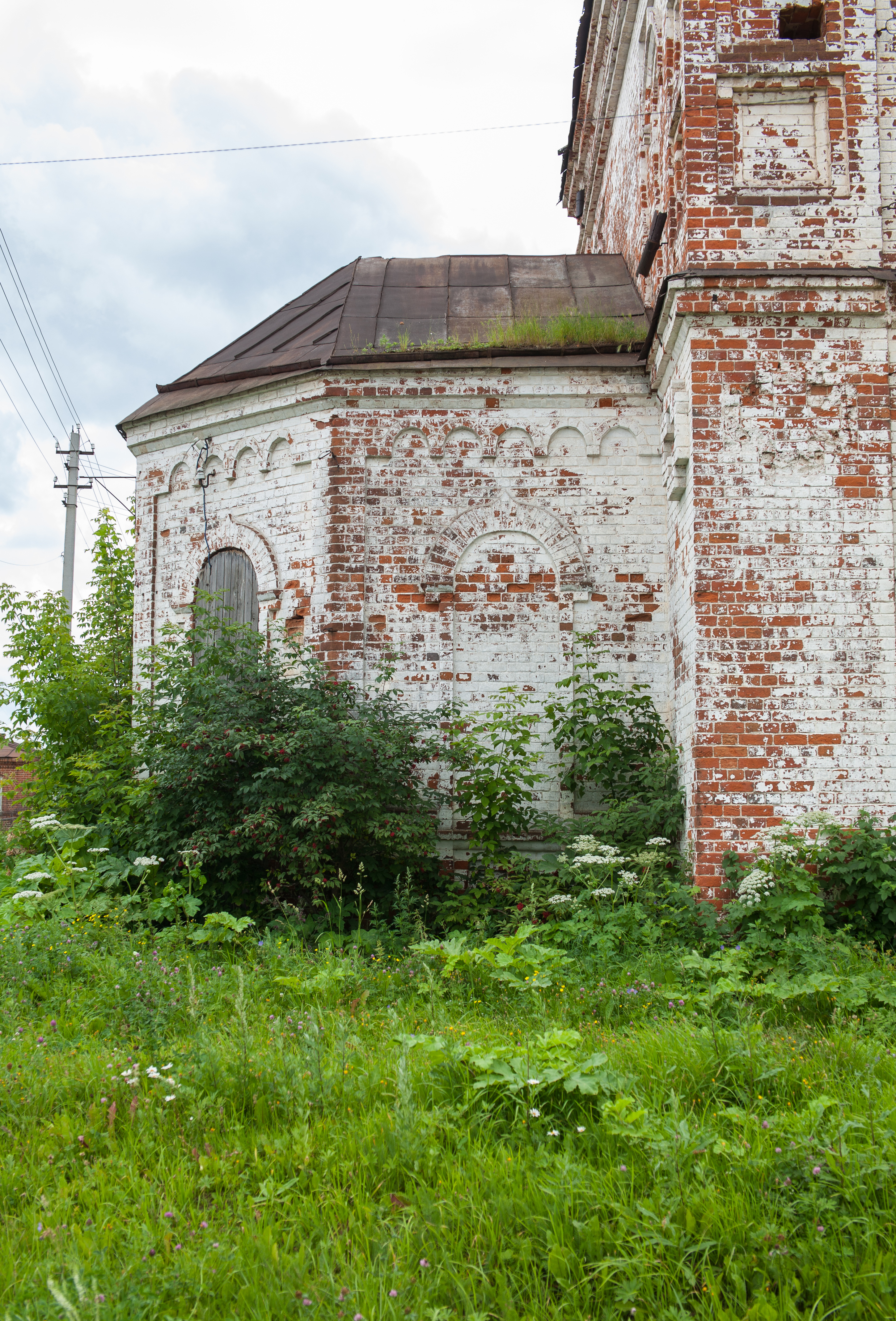 Кирпичная церковь в псевдорусском стиле, сооружённая на рубеже XIX—XX веков. Основной объём — бесстолпный двусветный четверик, в прошлом завершавшийся декоративным пятиглавием, трапезной соединён с колокольней. Закрыта не позже 1930-х годов, венчания сломаны, служила складом. Требует ремонта, заперта. Вид с севера на апсиду.